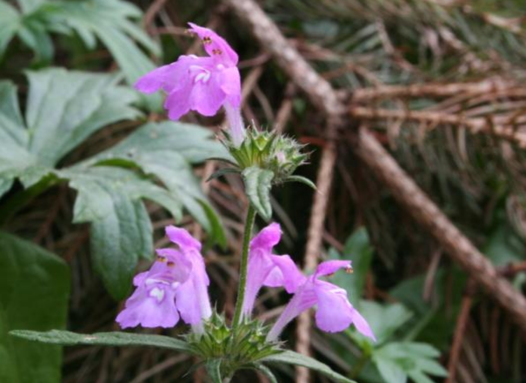 Galeopsis angustifolia